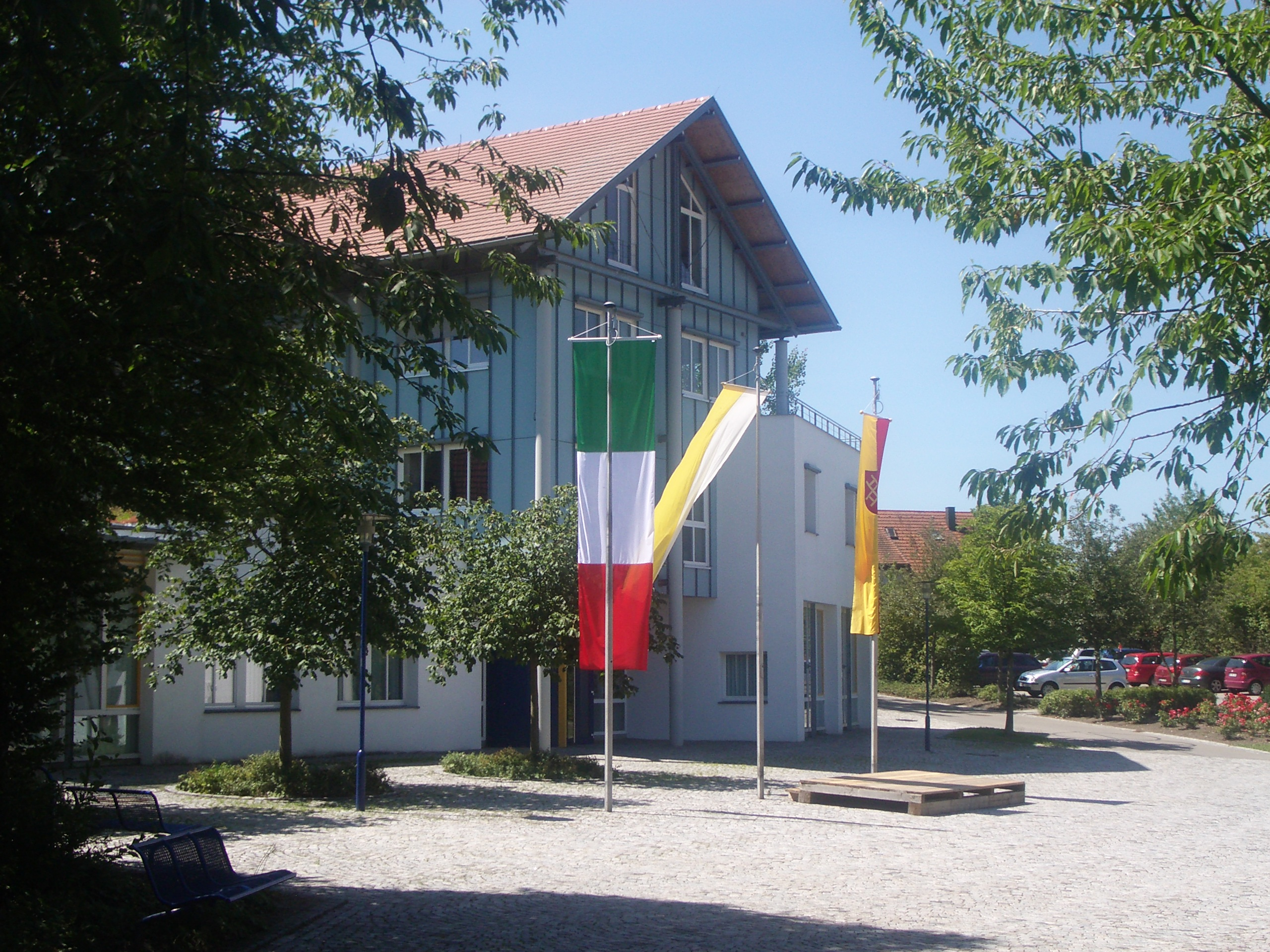 Rathaus, Bergstraße, D-88276 Berg